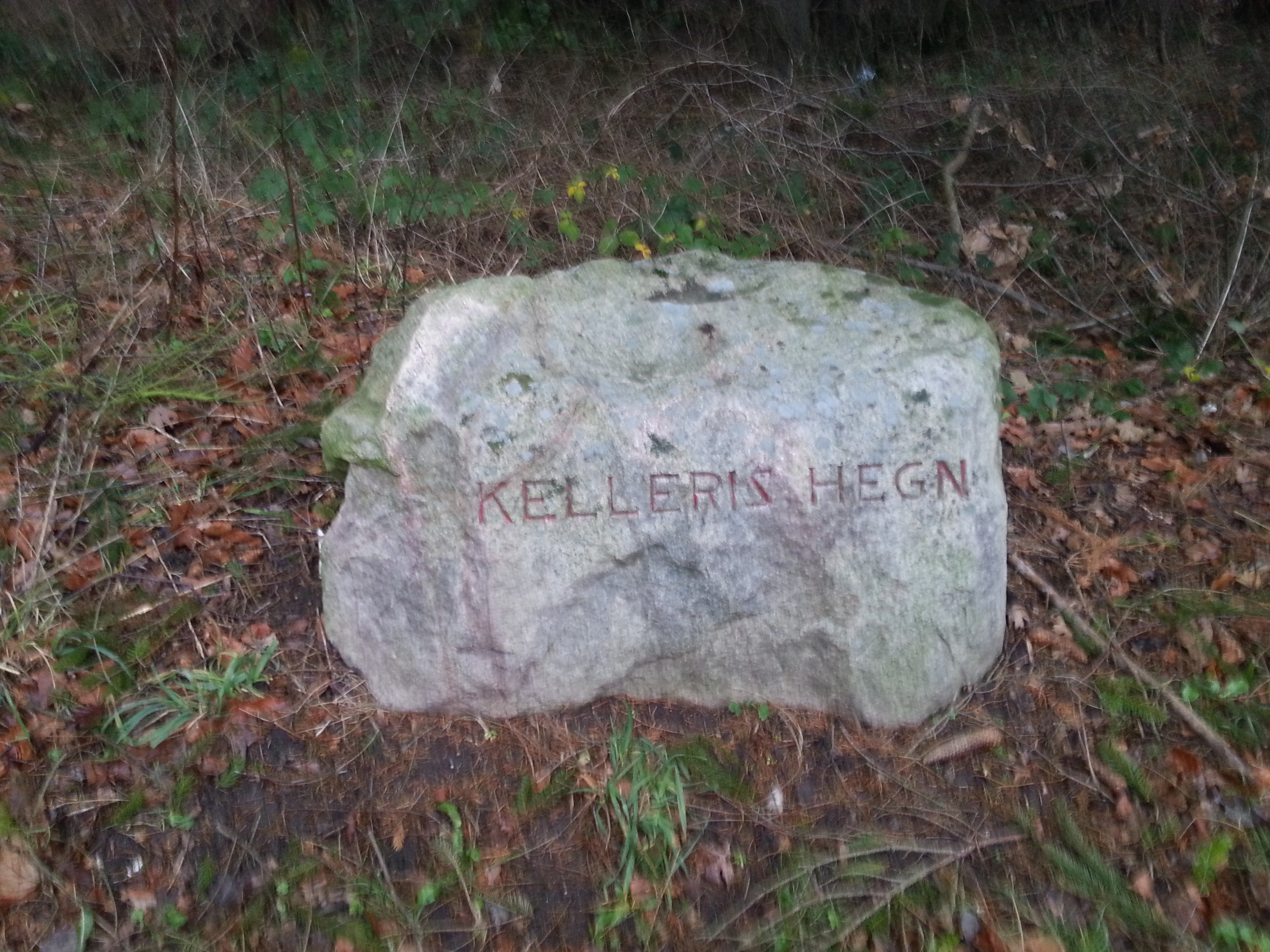 Markeringssten for Kelleris Hegn